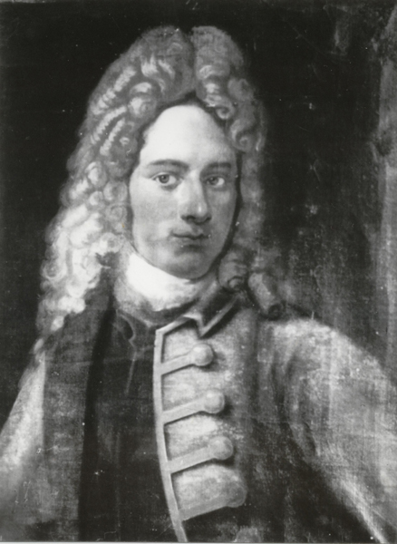 Heinrich Claus von Ficki portree